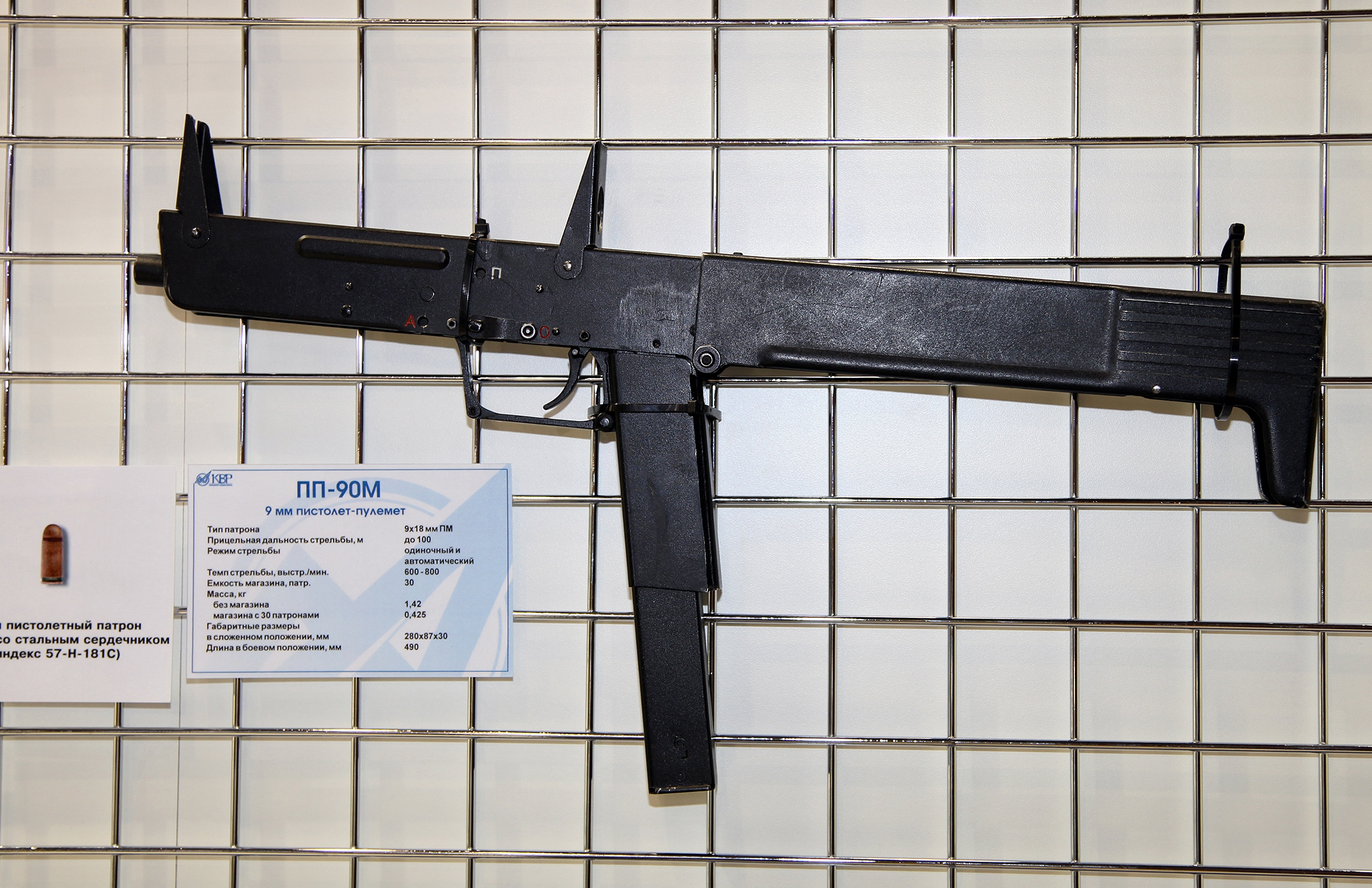 Пистолет-пулемет ПП-90М (PP-90M submachine gun)